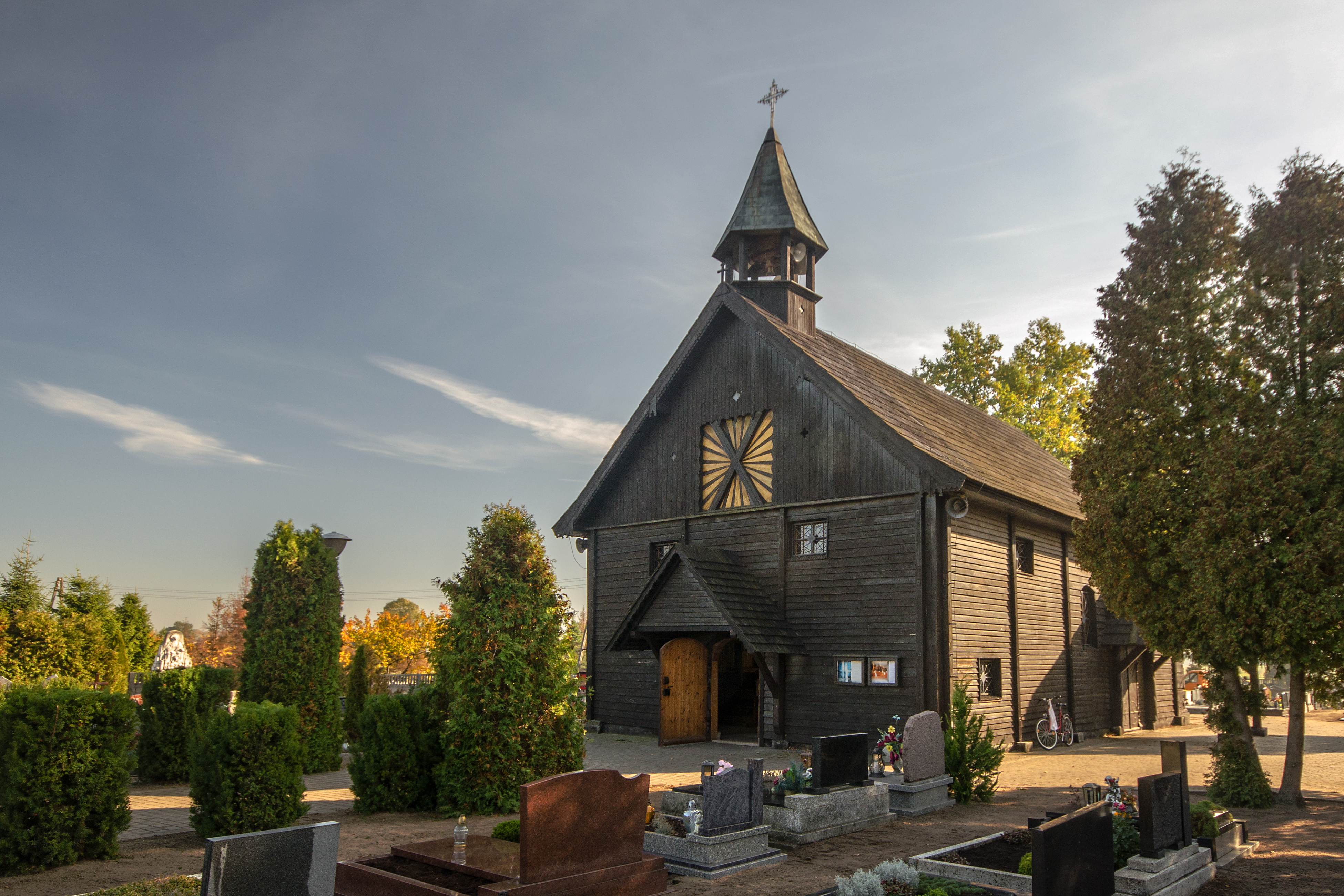 Popielów, kościół cmentarny p.w. Matki Boskiej i św. Andrzeja, 1654, 1889